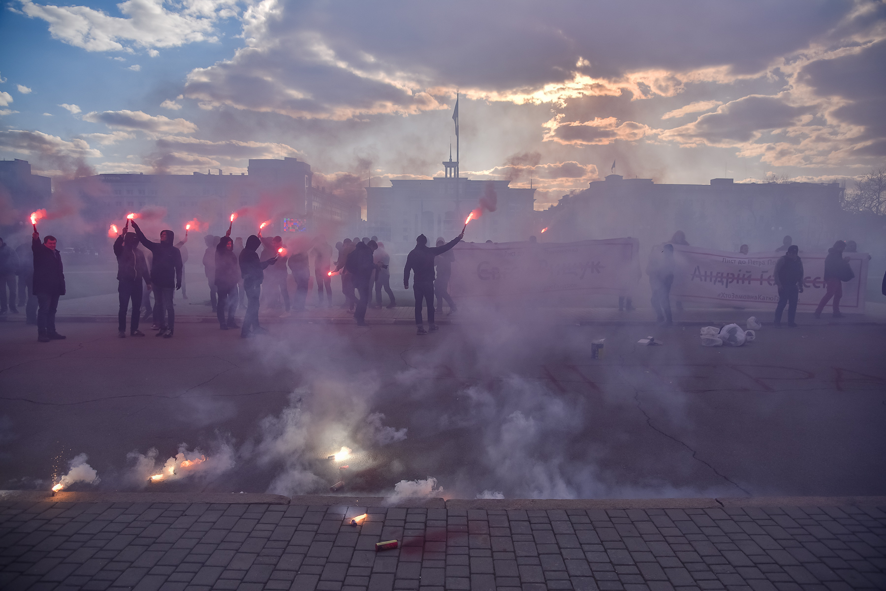 В Херсоні активісти та друзі Катерини Гандзюк провели кілька акцій, щоб нагадати - замовники вбивства Гандзюк досі на волі.